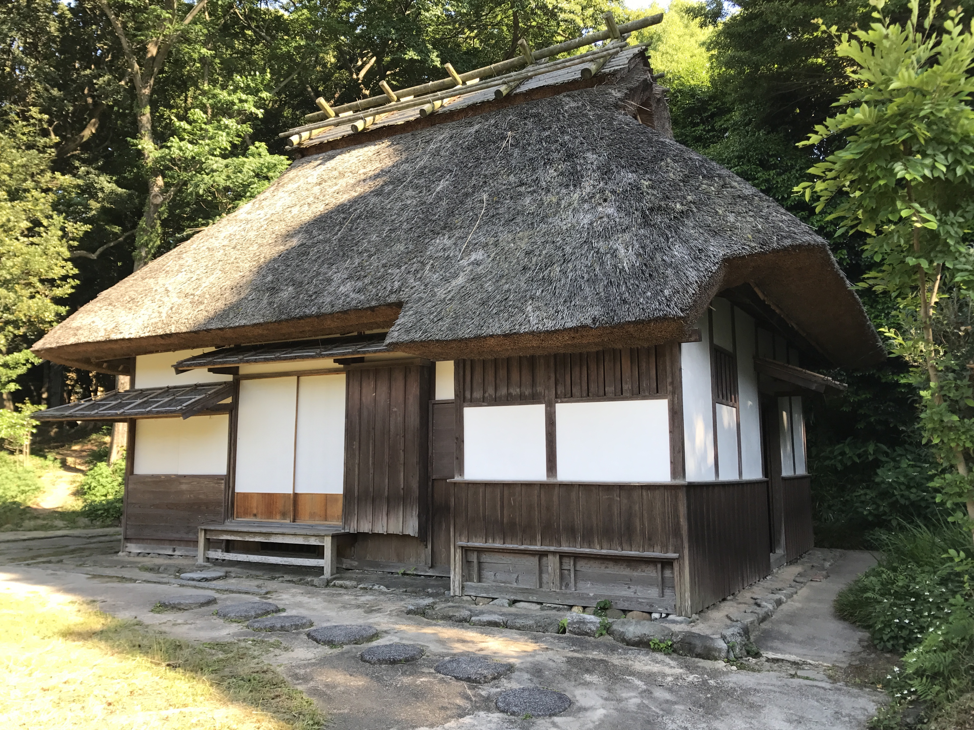 平尾山荘(野村望東尼別荘跡)